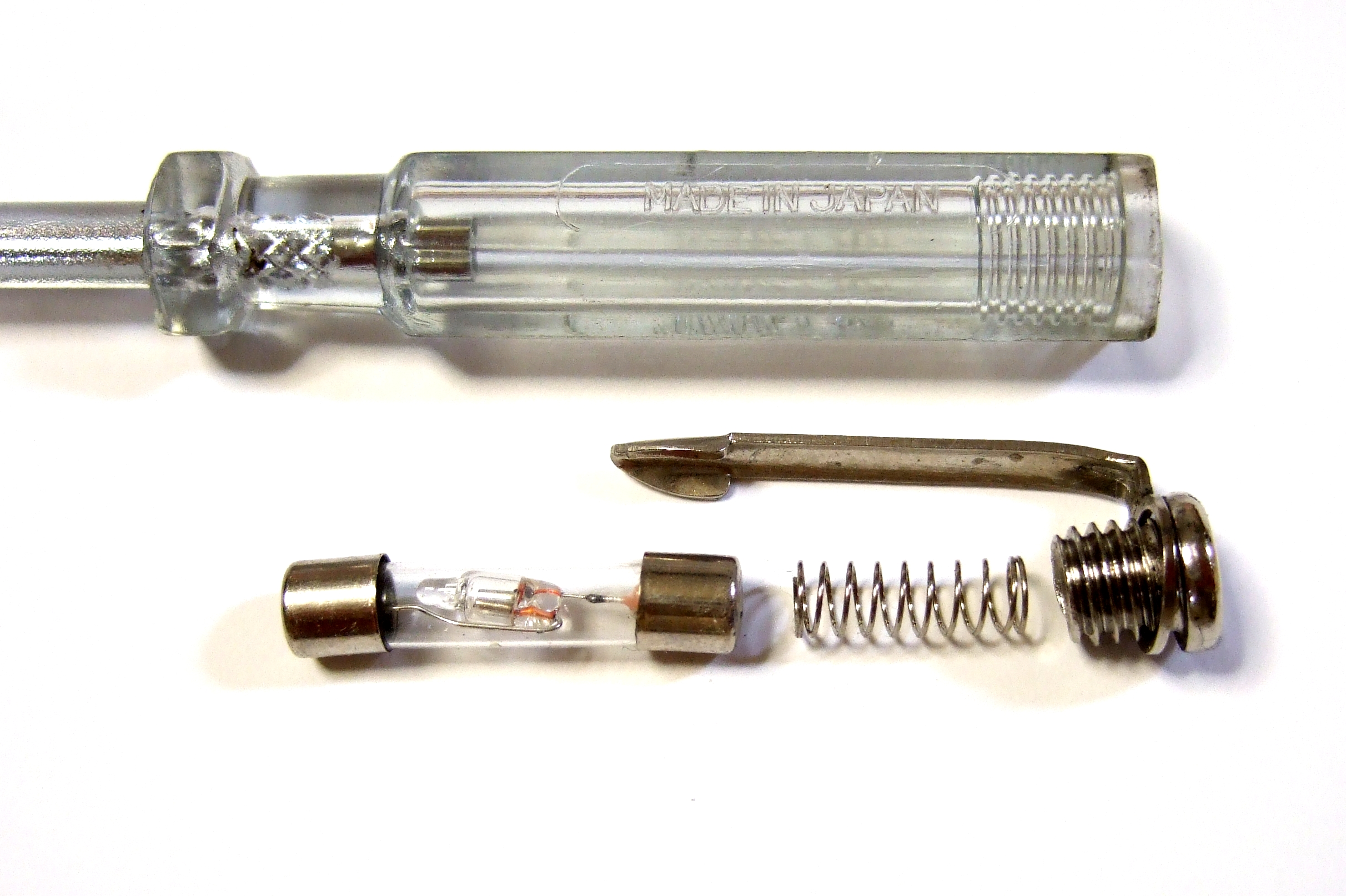 Kenden Driver. Photo taken in Tokyo Japan.